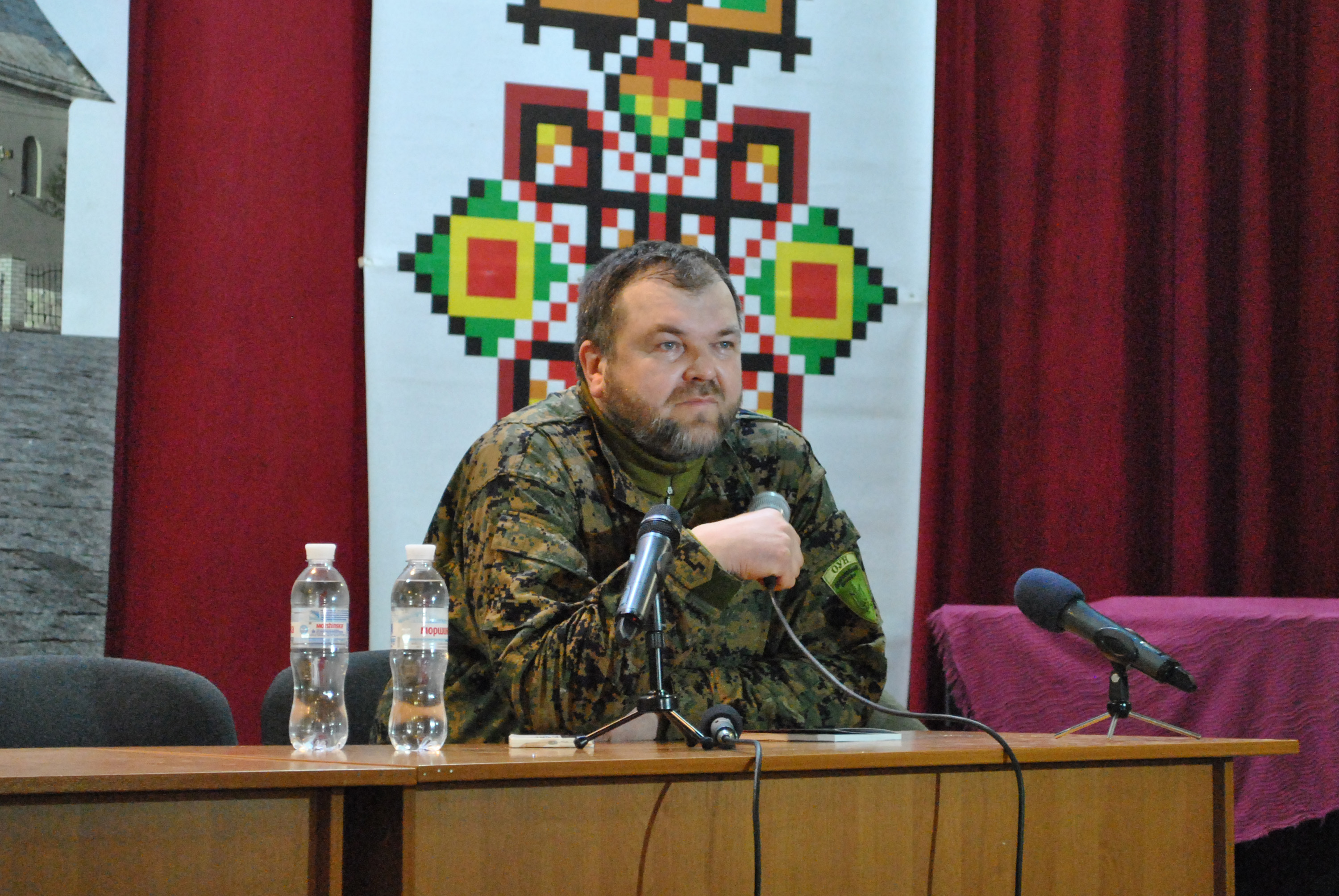 Український поет, прозаїк, автор проекту «Українські книги — українським тюрмам», координатор проекту «Інша література», член Національної спілки письменників України, заступник командира «Батальйону ОУН» Борис Гуменюк. Зустріч в Українському Домі «Перемога» в Тернополі 2 березня 2015 року: презентація «Віршів з війни» та розмова про війну та її Героїв.